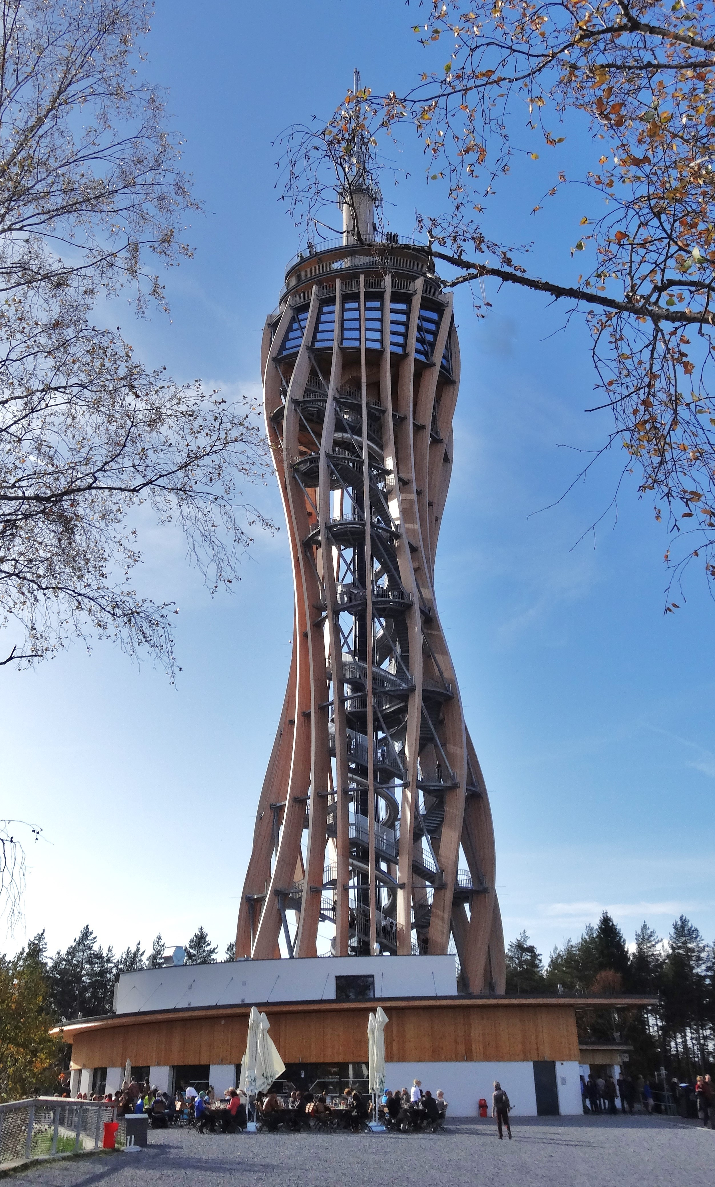 Der Aussichtsturm auf dem Pyramidenkogel